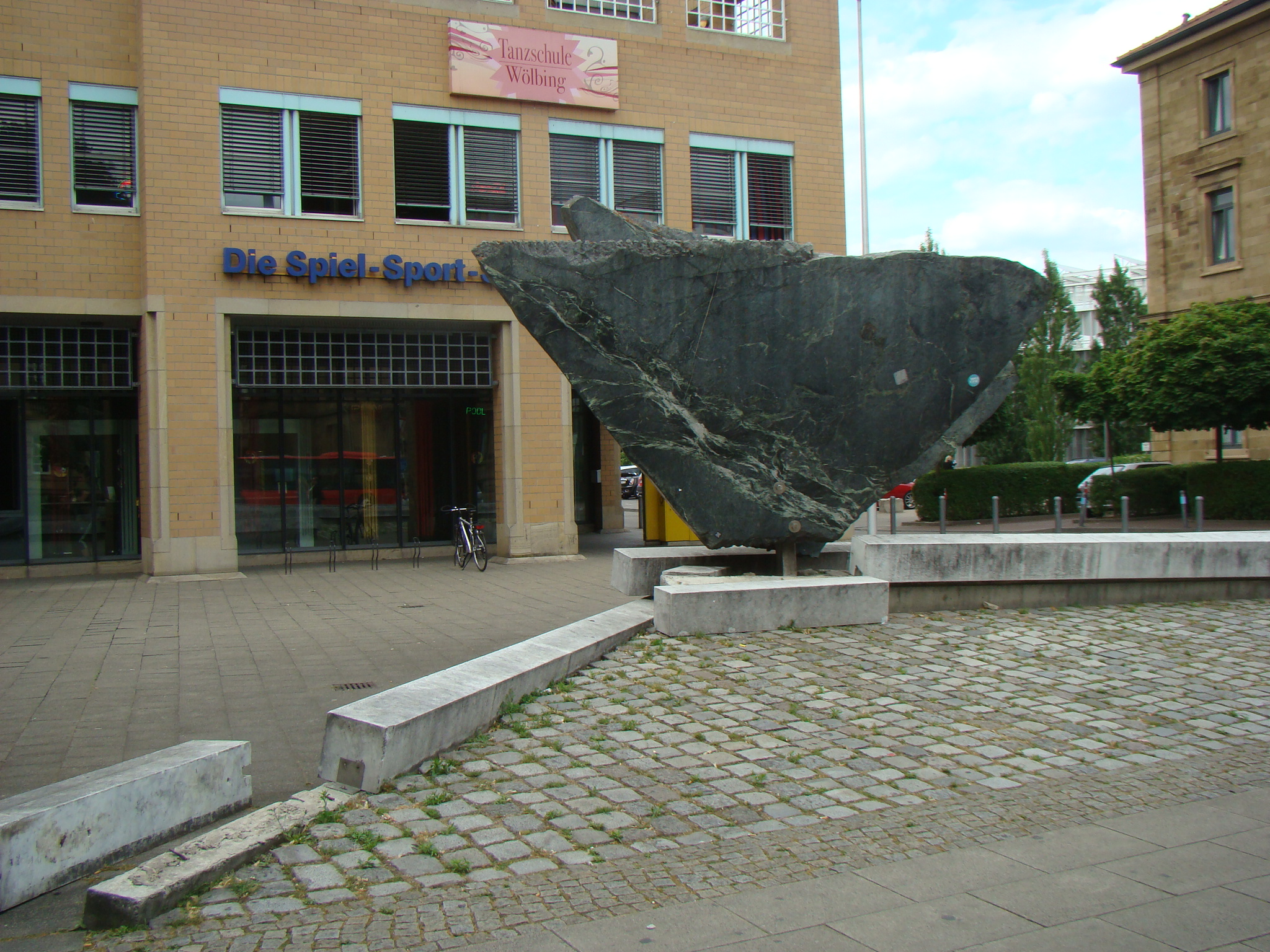 Skulptur Postsache von Ernst Günter Herrmann in der Bahnhofstraße in Heilbronn